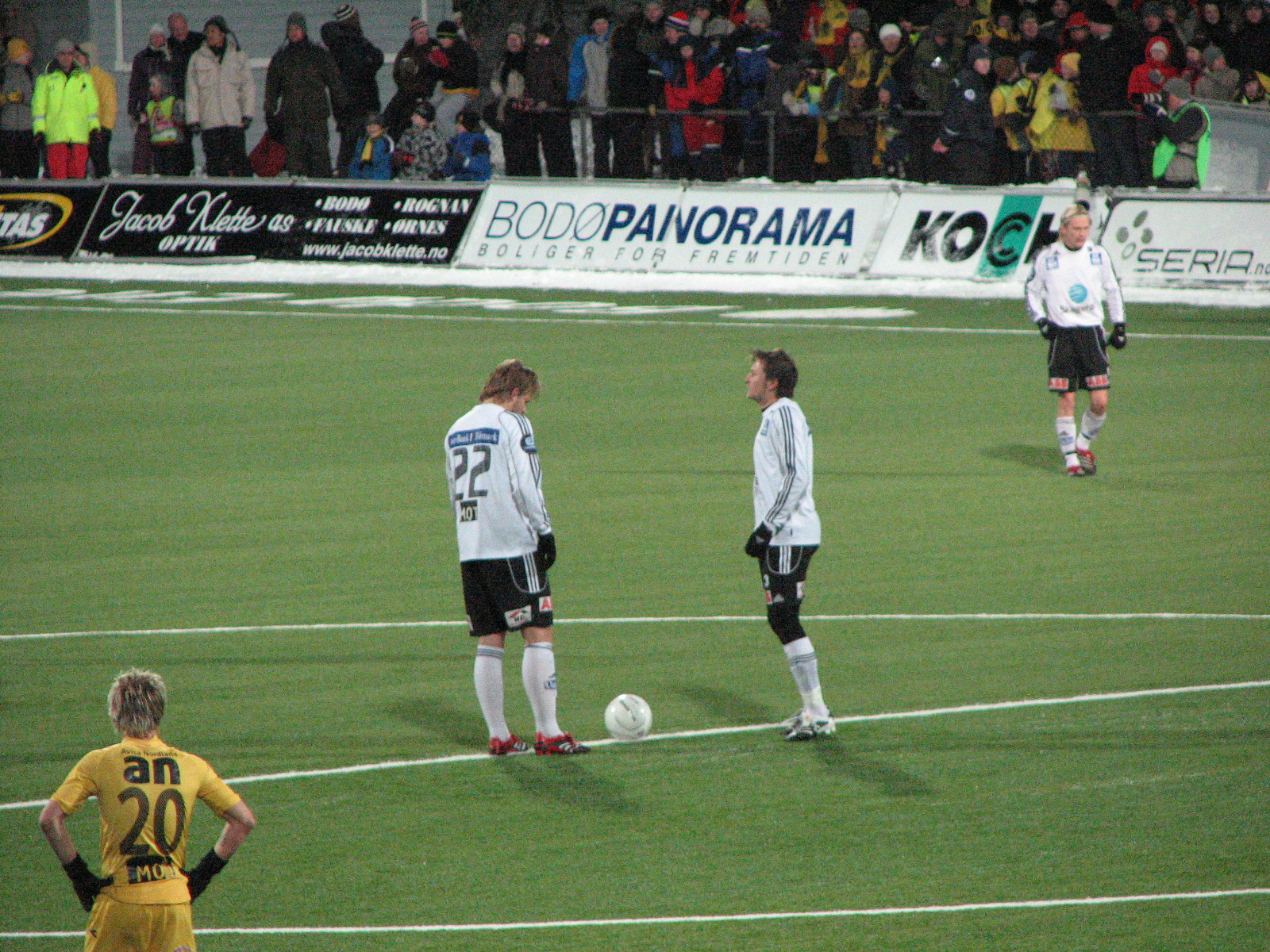 Tippeligakvalifiseringen mellom Bodø/Glimt og Odd Grenland. Starten av andre omgang (Odd starter)